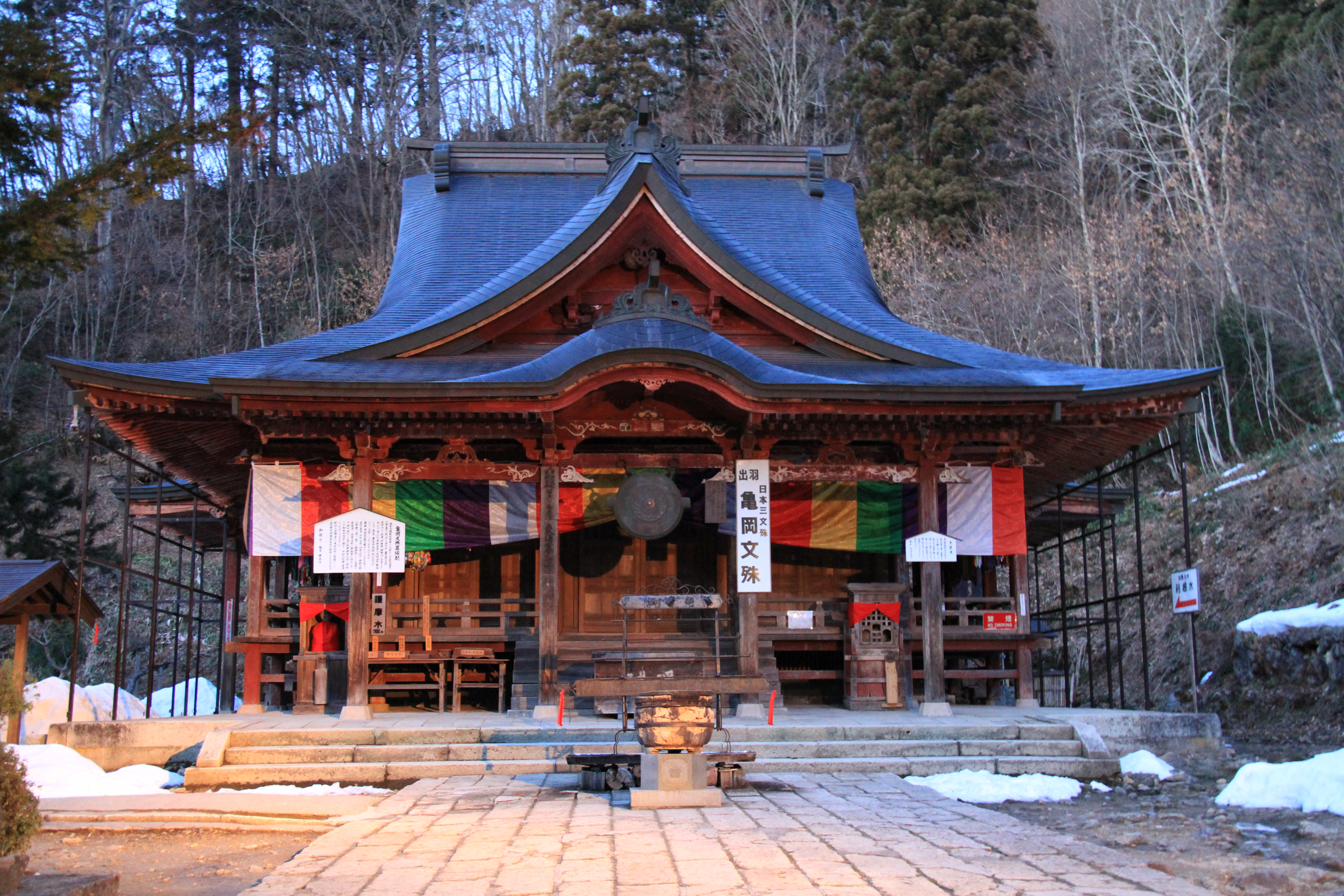 Kameoka, Takahata, Higashiokitama District, Yamagata Prefecture 992-0321, Japan